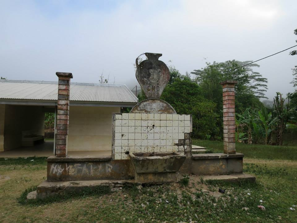 Remexio Vila